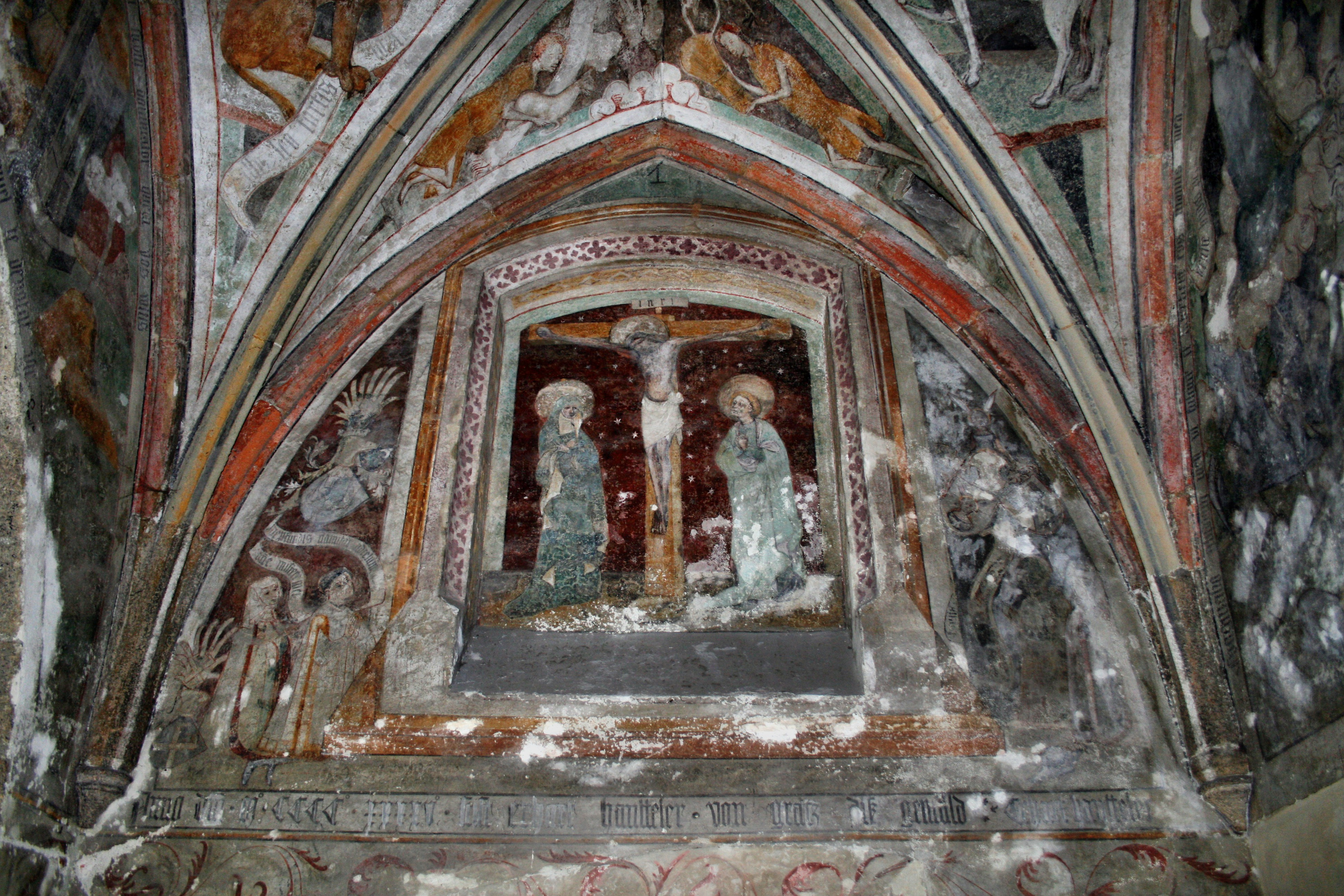 Fresko im östlichen Vorzeichen von Hans Strigel d. Ä. um 1445